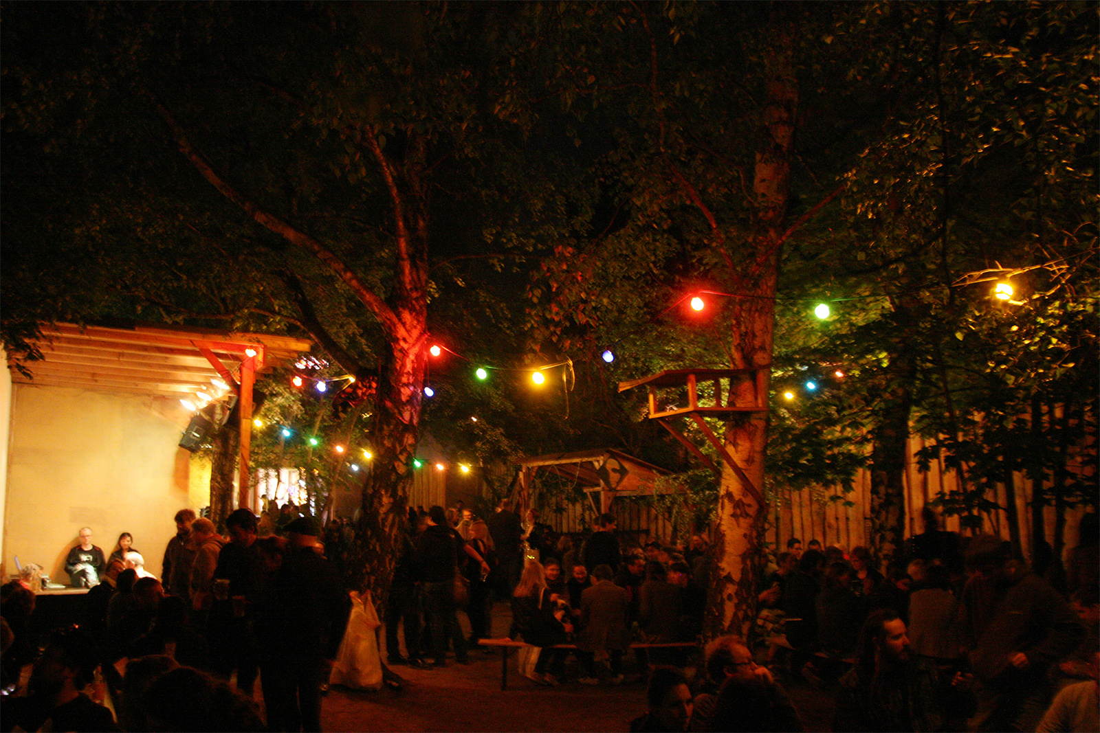 Braufest im Waldgarten - ZUKUNFT am Ostkreuz